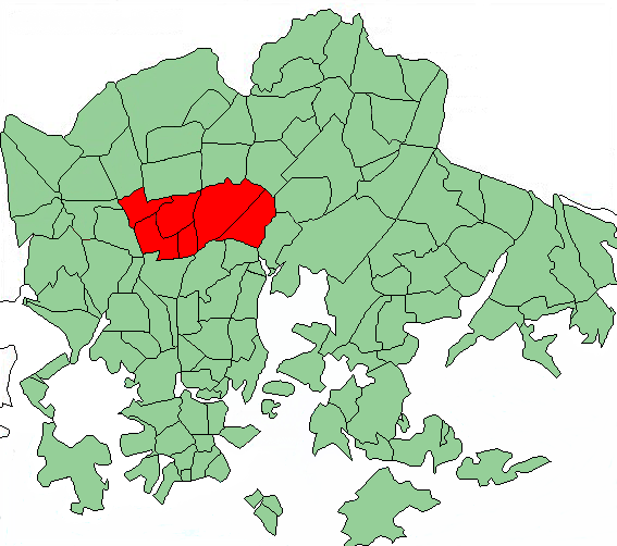 Map of Helsinki highlighting Oulunkylä